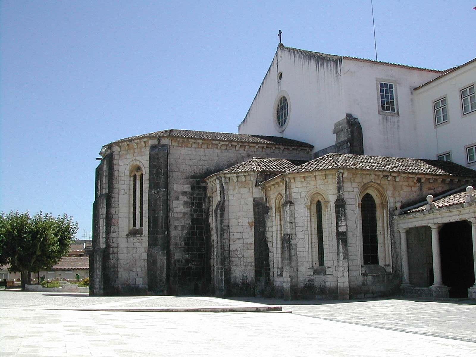 Mosteiro de Odivelas, Odivelas, Portugal